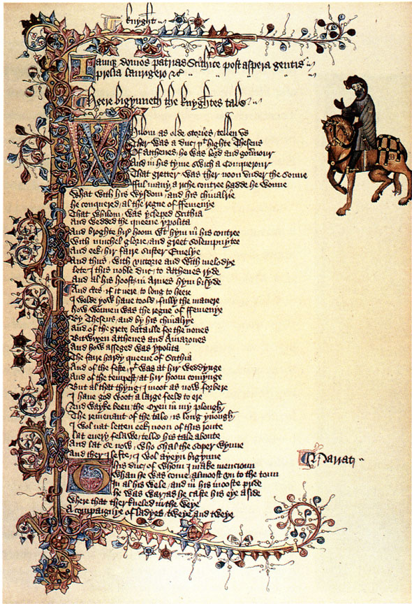 Début du Conte du Chevalier dans le manuscrit Ellesmere. Image dans le domaine public.